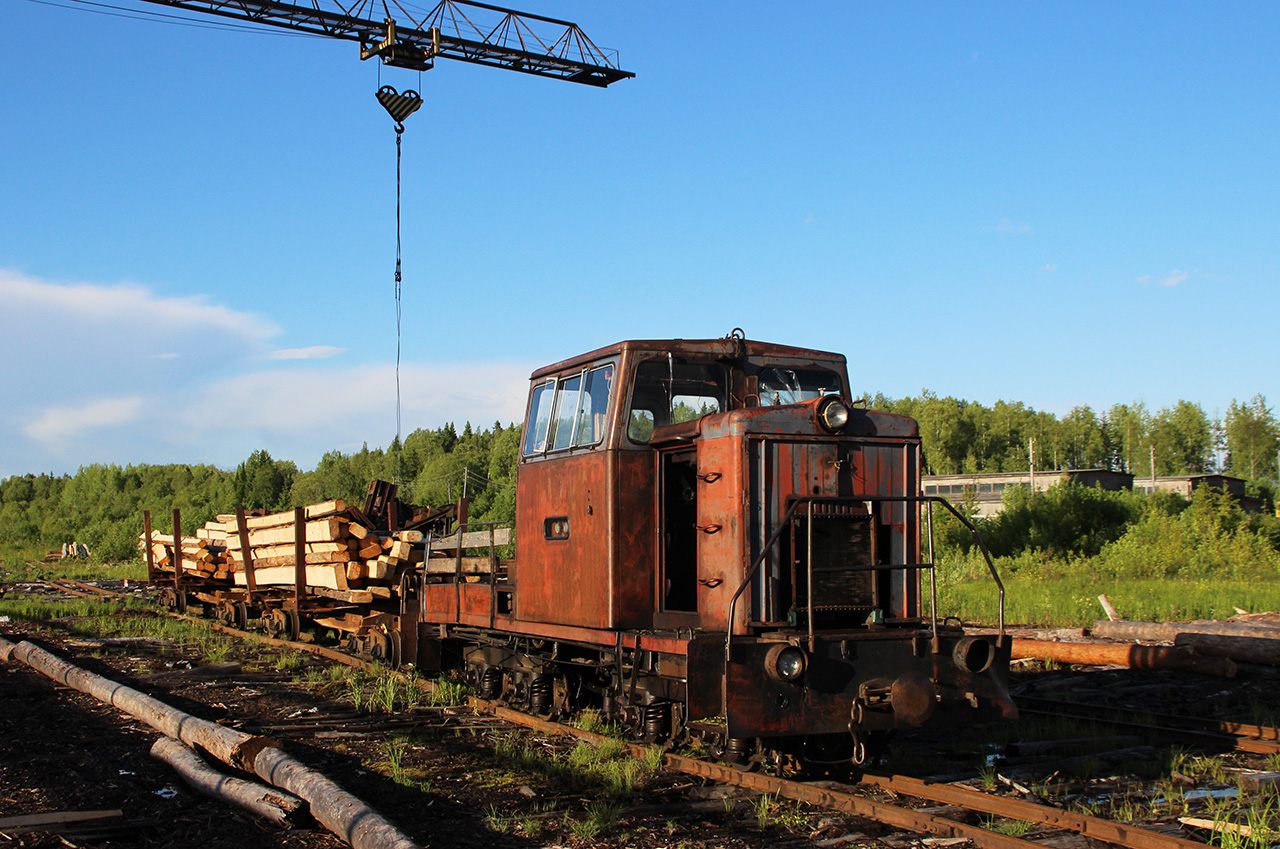 Тепловоз ТУ6Д-0385, Лунданская УЖД